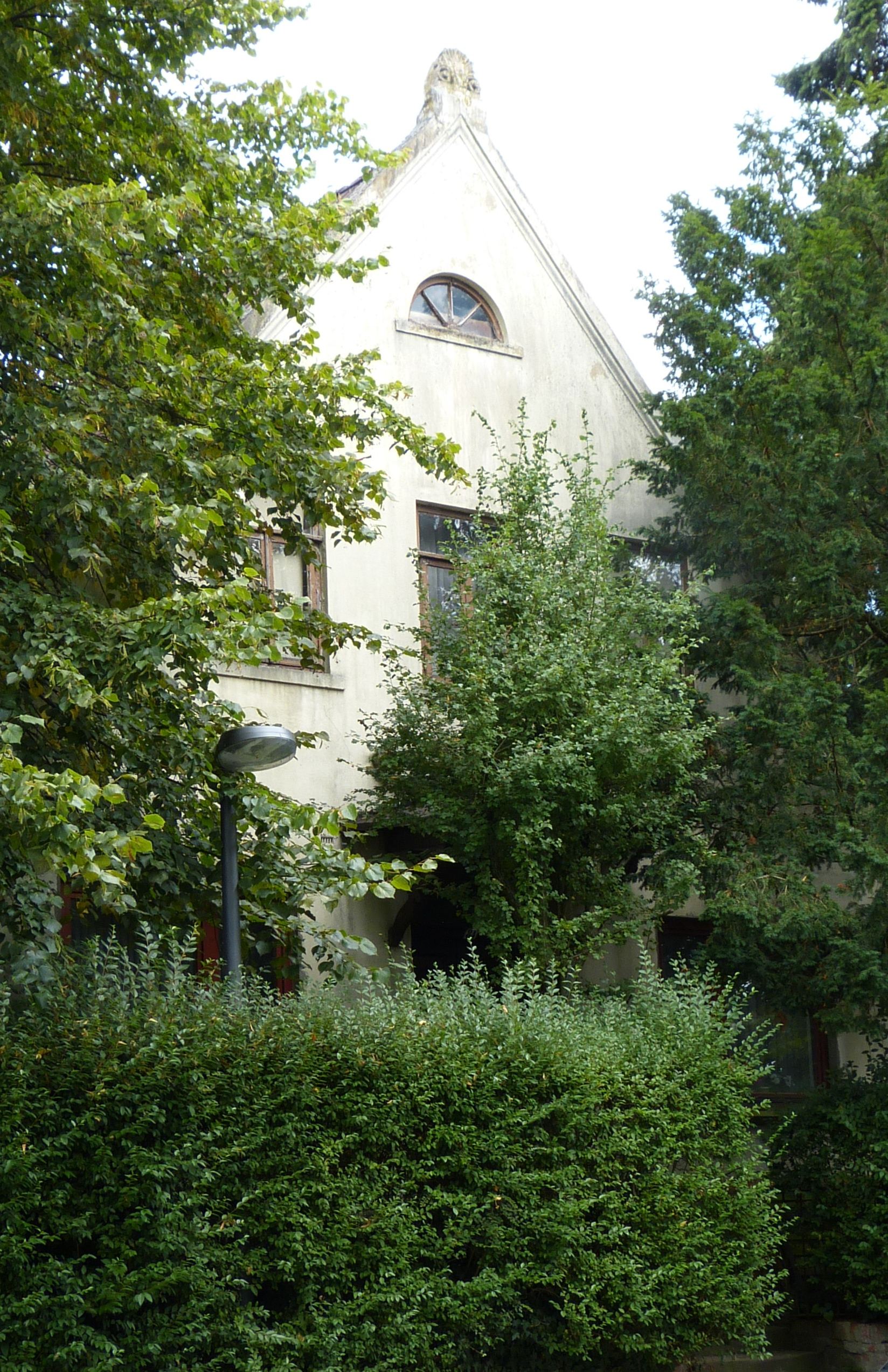 Haus Kapitän Dallmann in Bremen, Kapitän-Dallmann-Straße 84Das abgebildete Objekt ist ein geschütztes Kulturdenkmal in der Freien Hansestadt Bremen, mit der Nr. 1287 beim Landesamt für Denkmalpflege registriert.